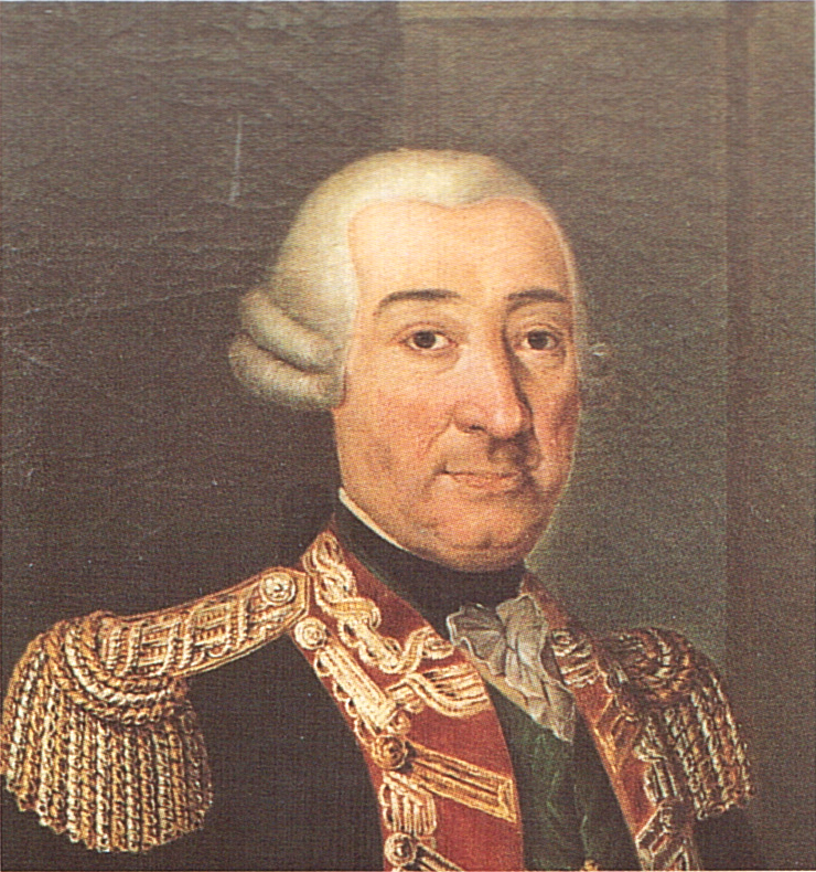 Conte Lorenzo Bernardino Pinto (1704-1788)